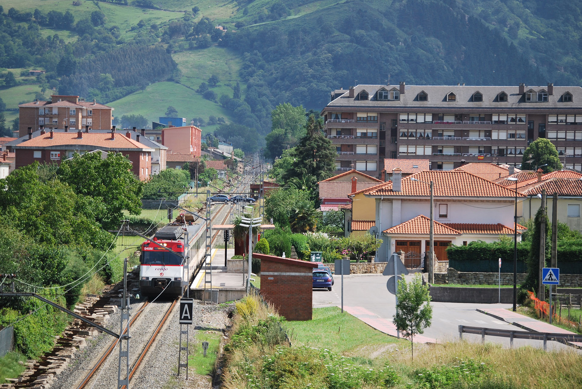 Cercanías en el apeadero de Lombera